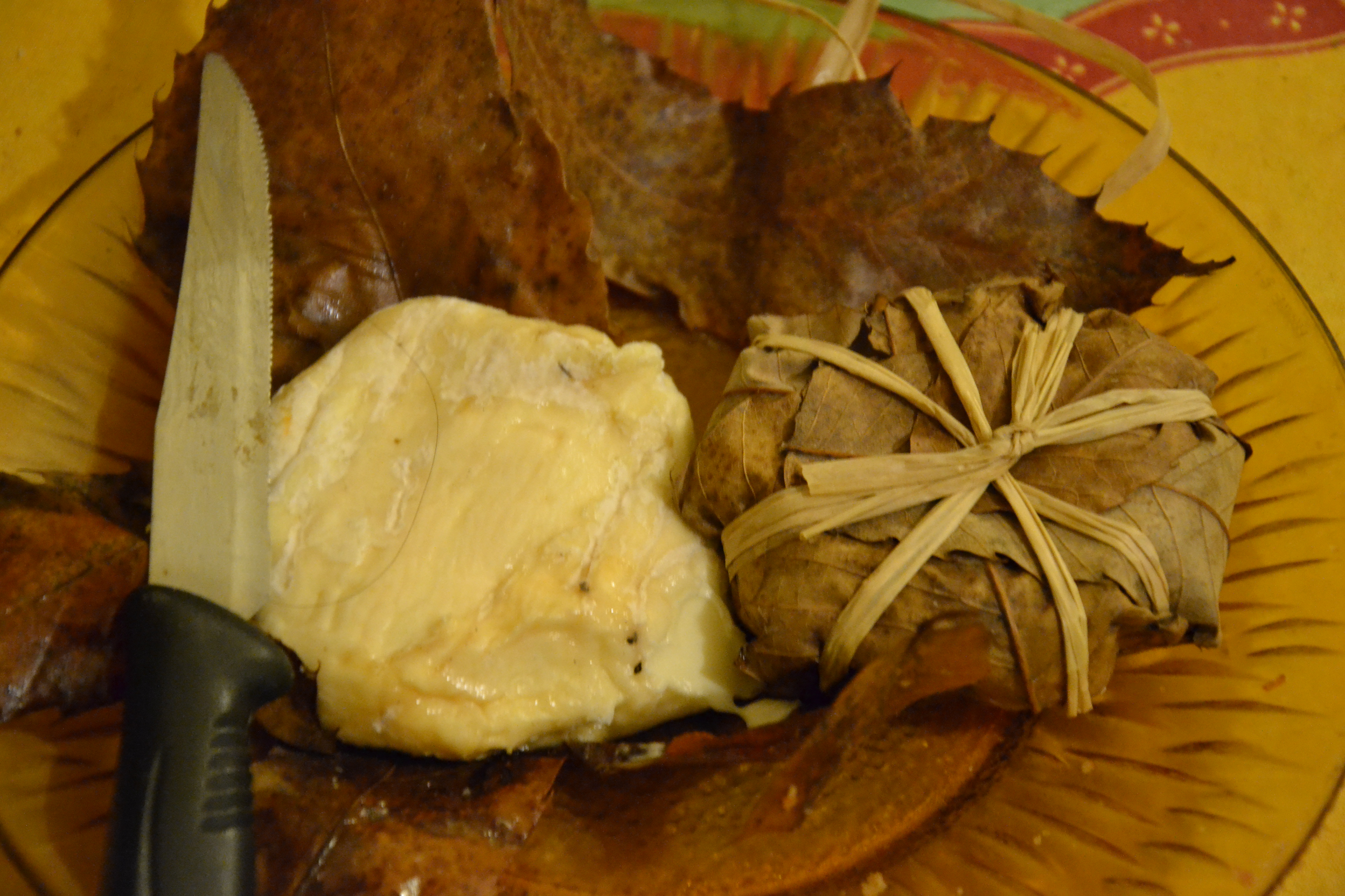 Fromage de Chèvre de Banon